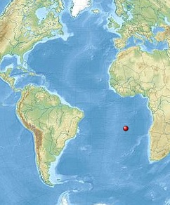 Géolocalisation de l'île Sainte-Hélène (WikiPédia)